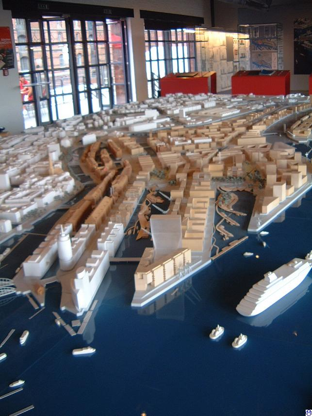 Planungsmodell der künftigen HafenCity (Im Kesselhaus in der Speicherstadt)